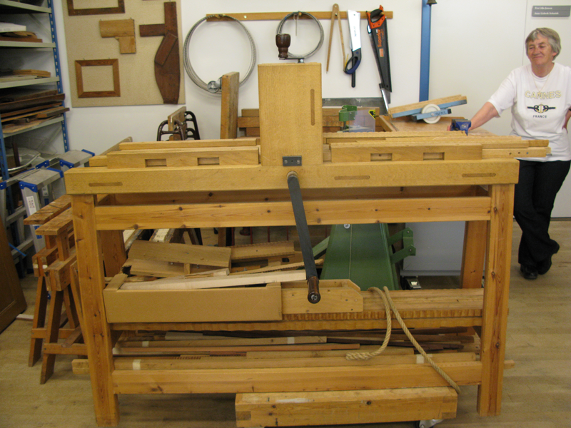 Flammelistehøvl #3. Høvl set på Nationalmuseets møbelkonserveringsværksted i Brede.